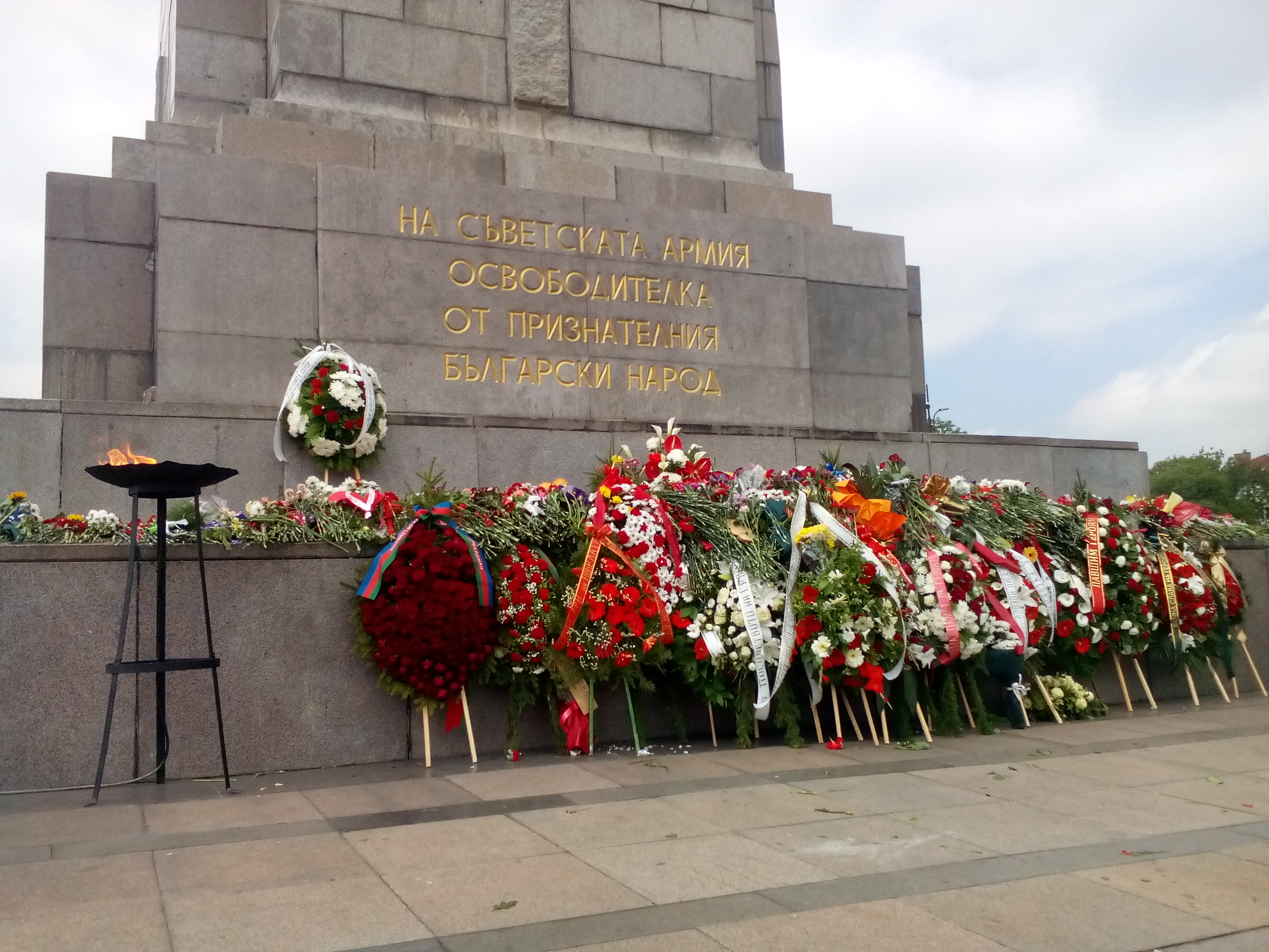 Венци и цветя на паметника на Съветската армия в София по случай Денят на Победата - 9 май 2016 г.